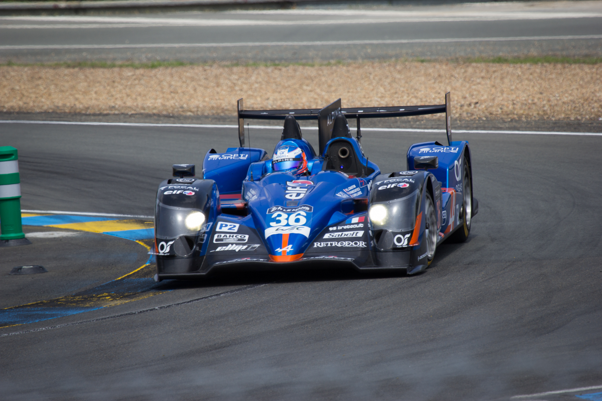 Signatech Alpine - Alpine A450B Nissan #36